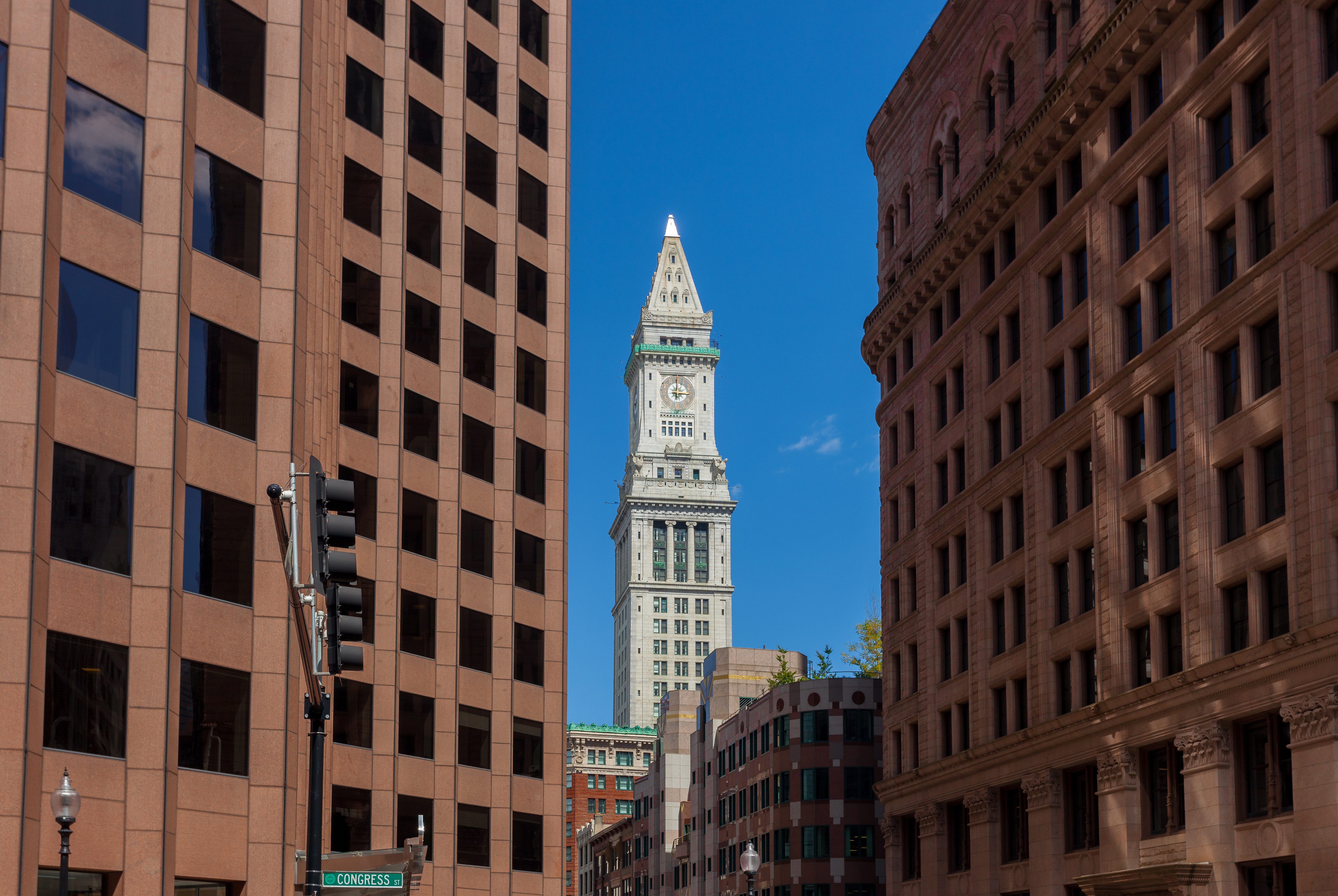 Custom House Tower, Boston